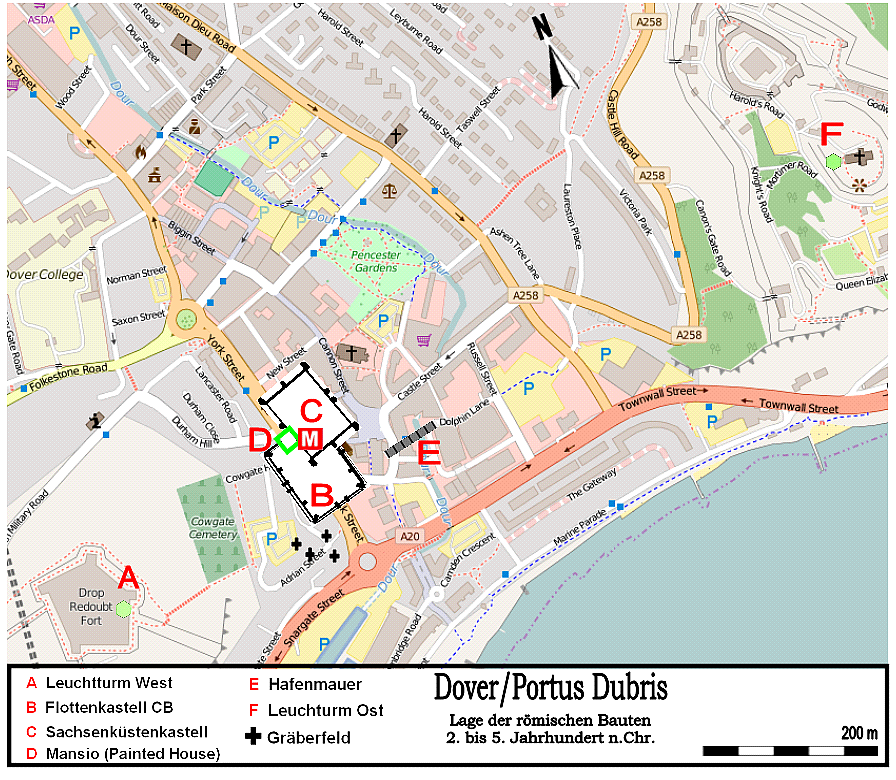 Lageskizze des römischen Dover (GB), Kastelle, Vicus, Hafen und Leuchttürme, 2.- 5. Jahrhundert n.Chr.